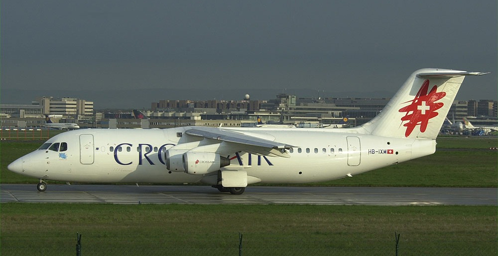 BAe 146-300 der Crossair mit dem Luftfahrzeugkennzeichen HB-IXM auf dem Flughafen Frankfurt. Die Maschine stürzte am 24. November 2001 in der Nähe von Bassersdorf ab.